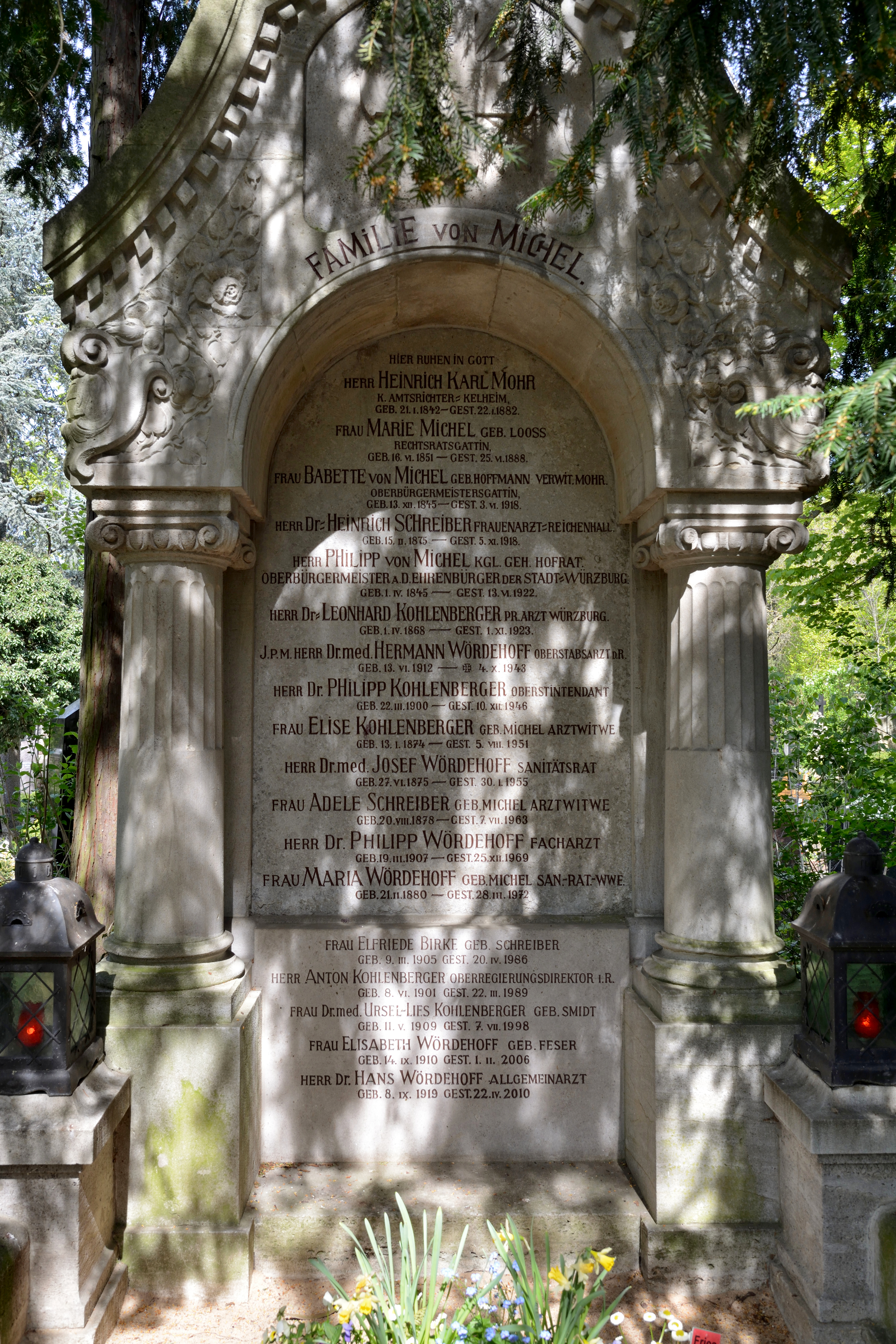 Impressionen vom Hauptfriedhof Würzburg Grabmal von Philipp von Michel